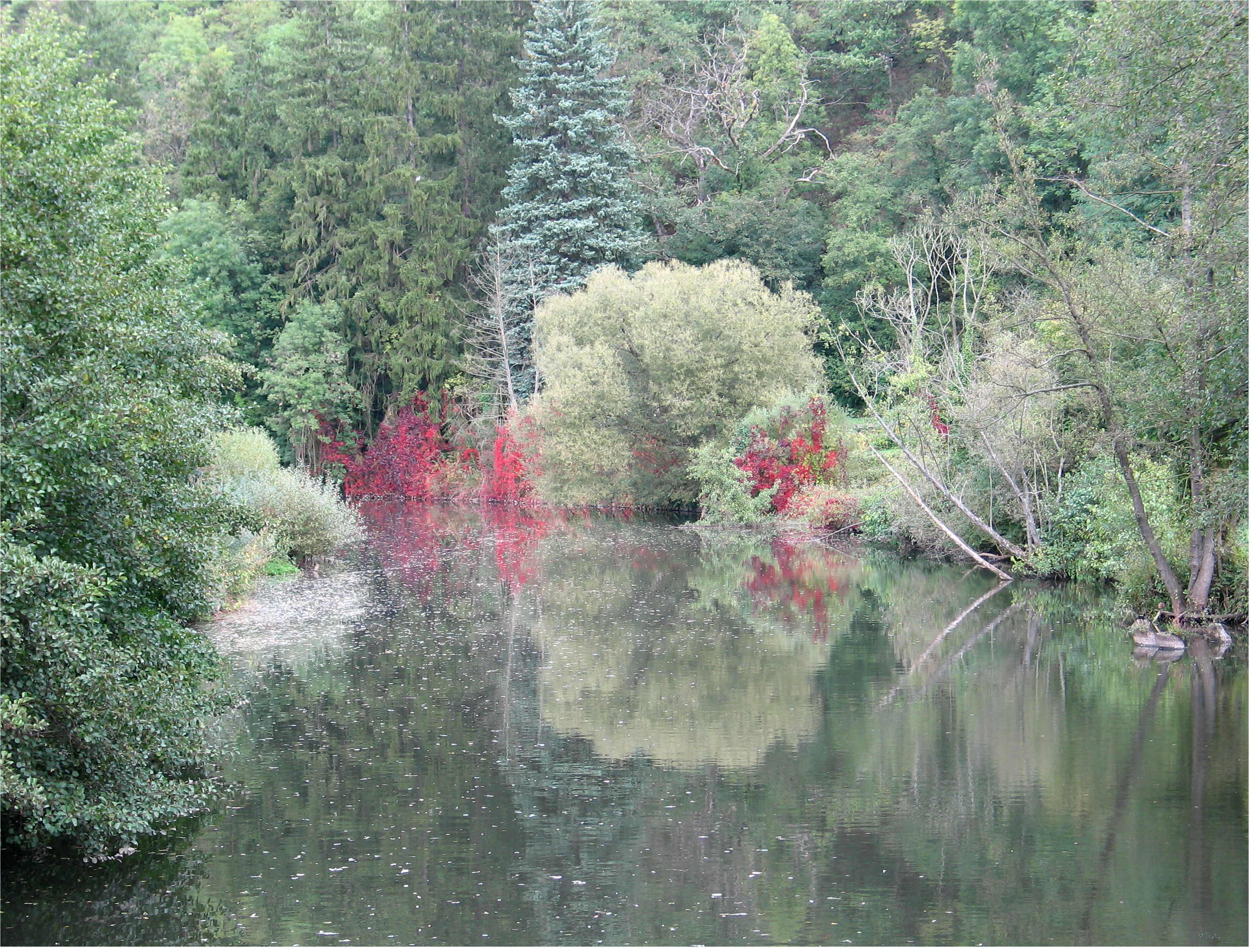 De Glan zu Meisenheim.